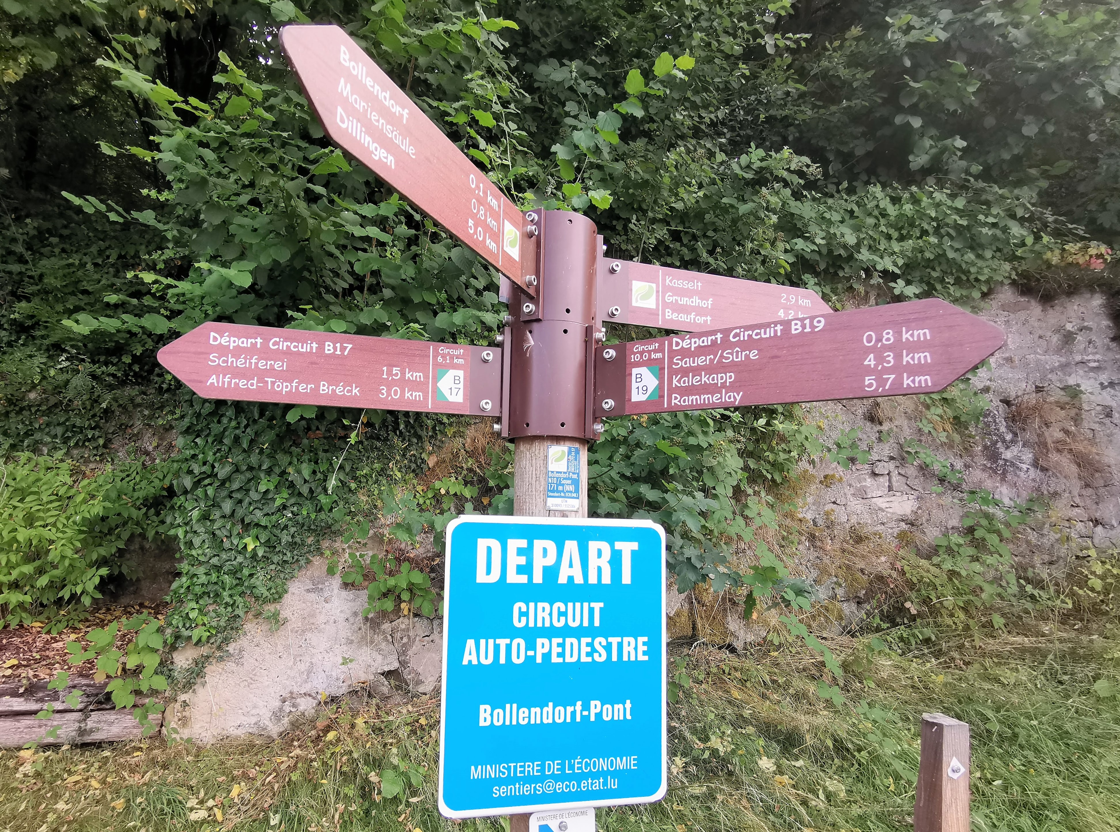 Bollendorf-Pont, commune de Berdorf. Panneaux de randonnées pédestres.